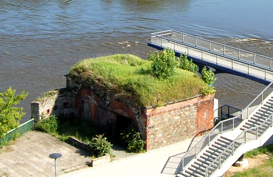 Reste des Eisenbahnfestungstores, Blick vom Turm Hinter der Zufahrt zur Möllenvogtei